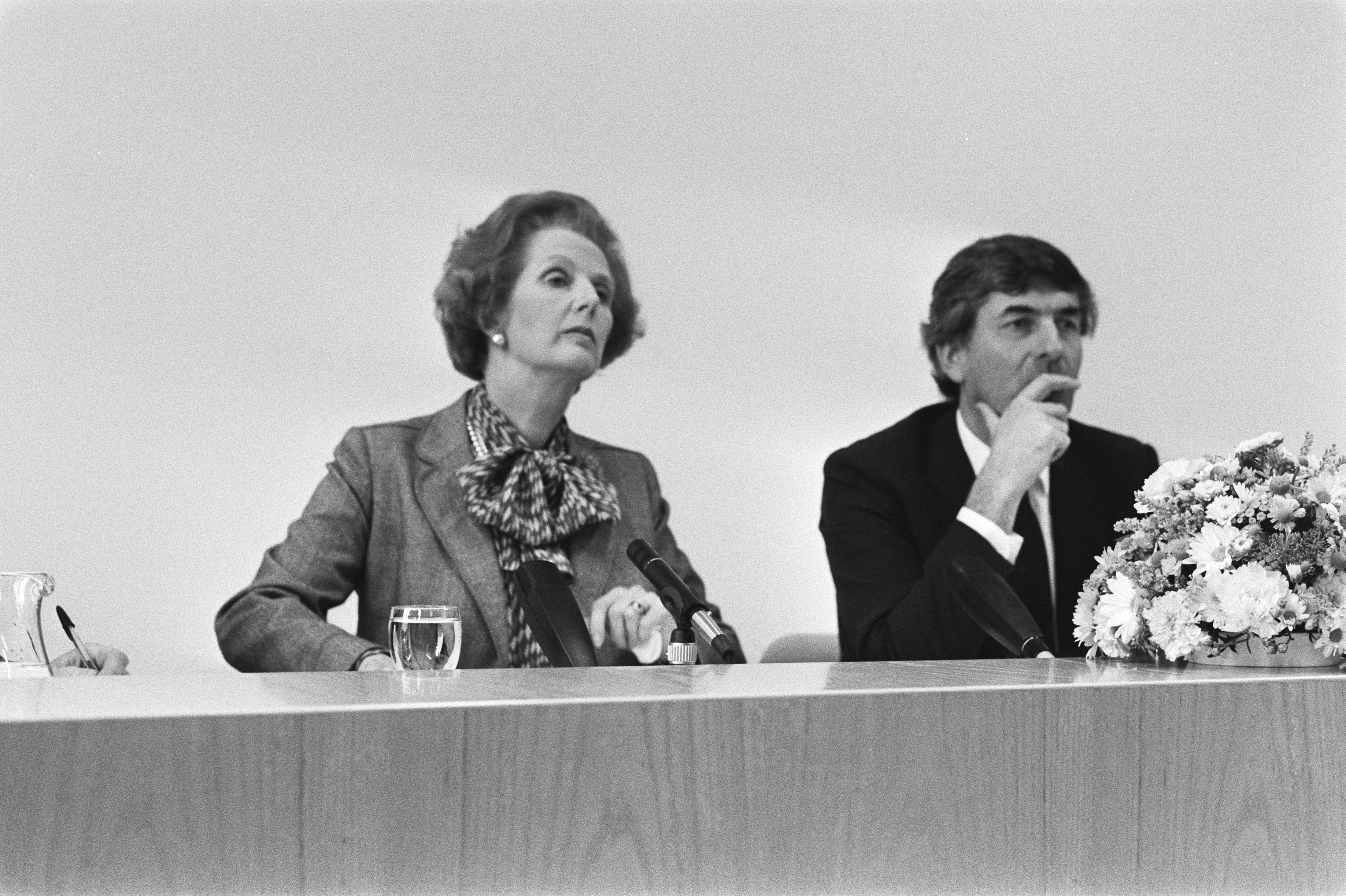 Collectie / Archief : Fotocollectie Anefo Reportage / Serie : Bezoek Engelse premier Margaret Thatcher Beschrijving : Premier Thatcher (l) en premier Lubbers tijdens een persconferentie Datum : 19 september 1983 Trefwoorden : ministers-presidenten, persconferenties Persoonsnaam : Lubbers, Ruud, Thatcher, Margaret Fotograaf : Bogaerts, Rob / Anefo Auteursrechthebbende : Nationaal Archief Materiaalsoort : Negatief (zwart/wit) Nummer archiefinventaris : bekijk toegang 2.24.01.05 Bestanddeelnummer : 932-7047